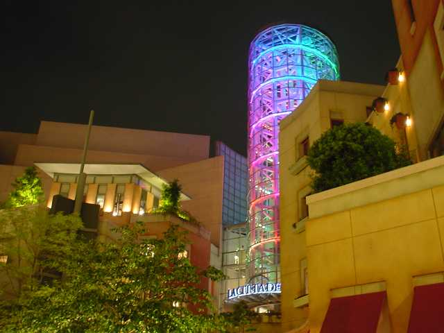 チネチッタ川崎（2005年6月投稿者が撮影）